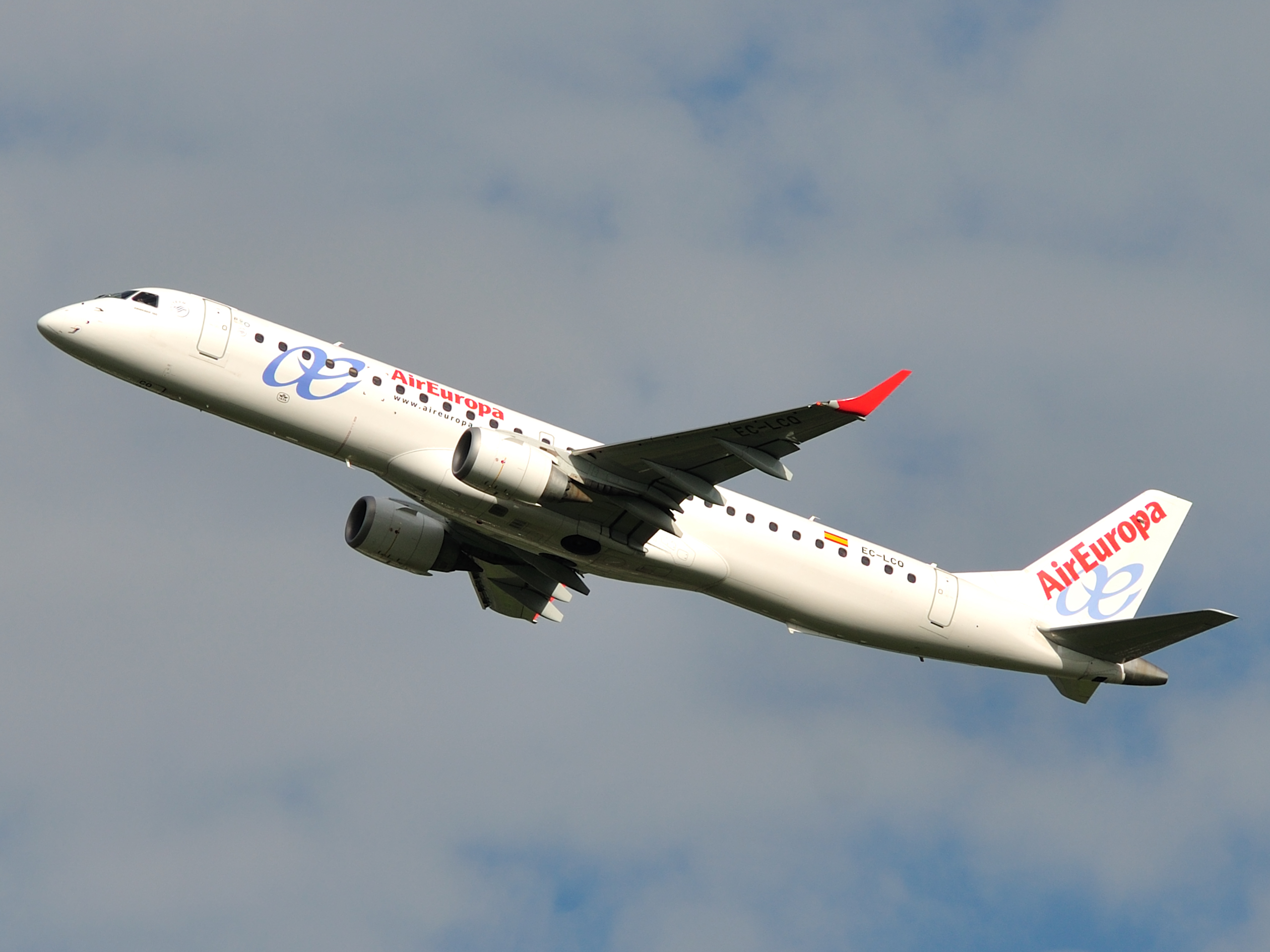 Air Europe Embraer 195 EC-LCQ